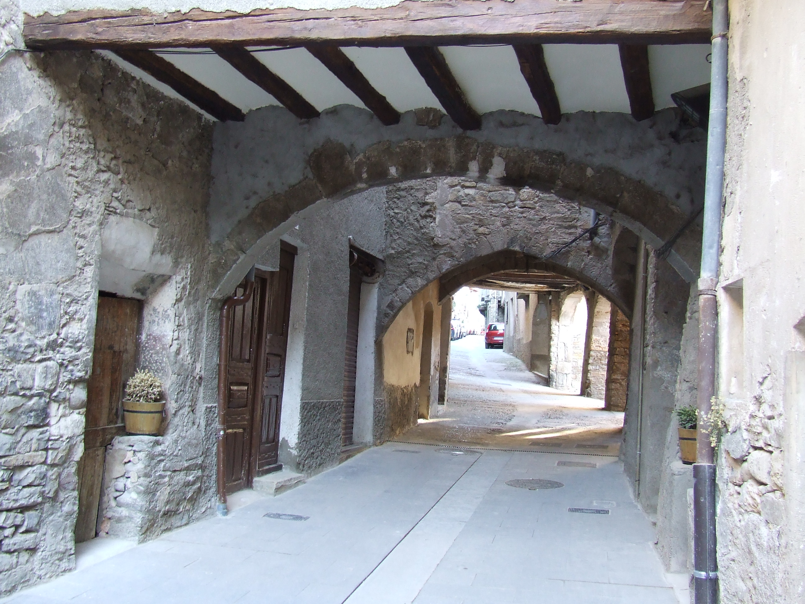 Carrer de Sant Cebrià Alt, clarament medieval (Salàs de Pallars, Pallars Jussà)